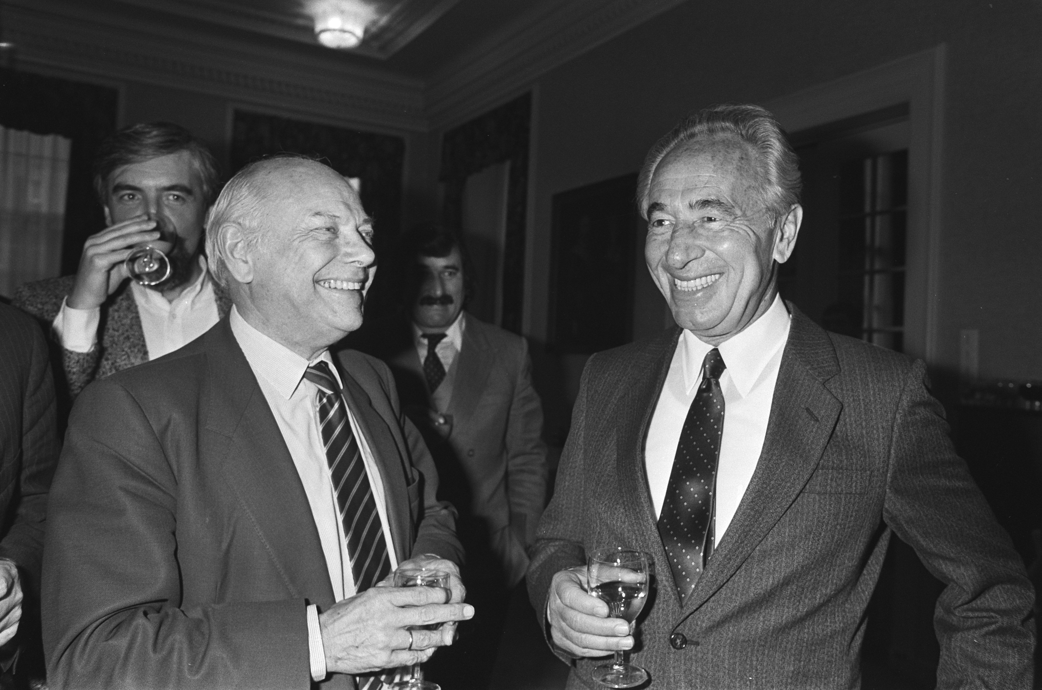 sraelische premier Peres ontmoet oppositieleider Den Uyl (links) in 2e Kamer. Bezoek van Shimon Peres. Locatie: Den Haag, Zuid-Holland